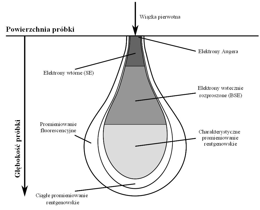 Uproszczony schemat obrazujący oddziaływanie elektron-próbka w przypadku SEM